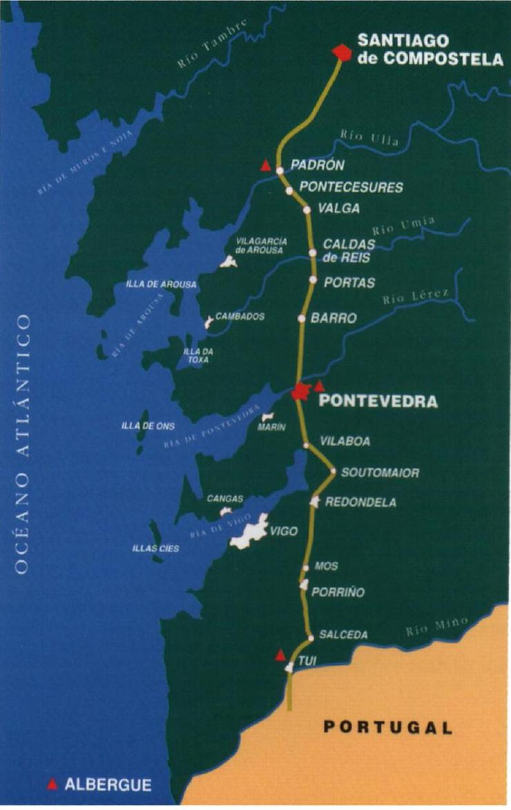 Mapa del Camino Portugues a Santiago (zona española).